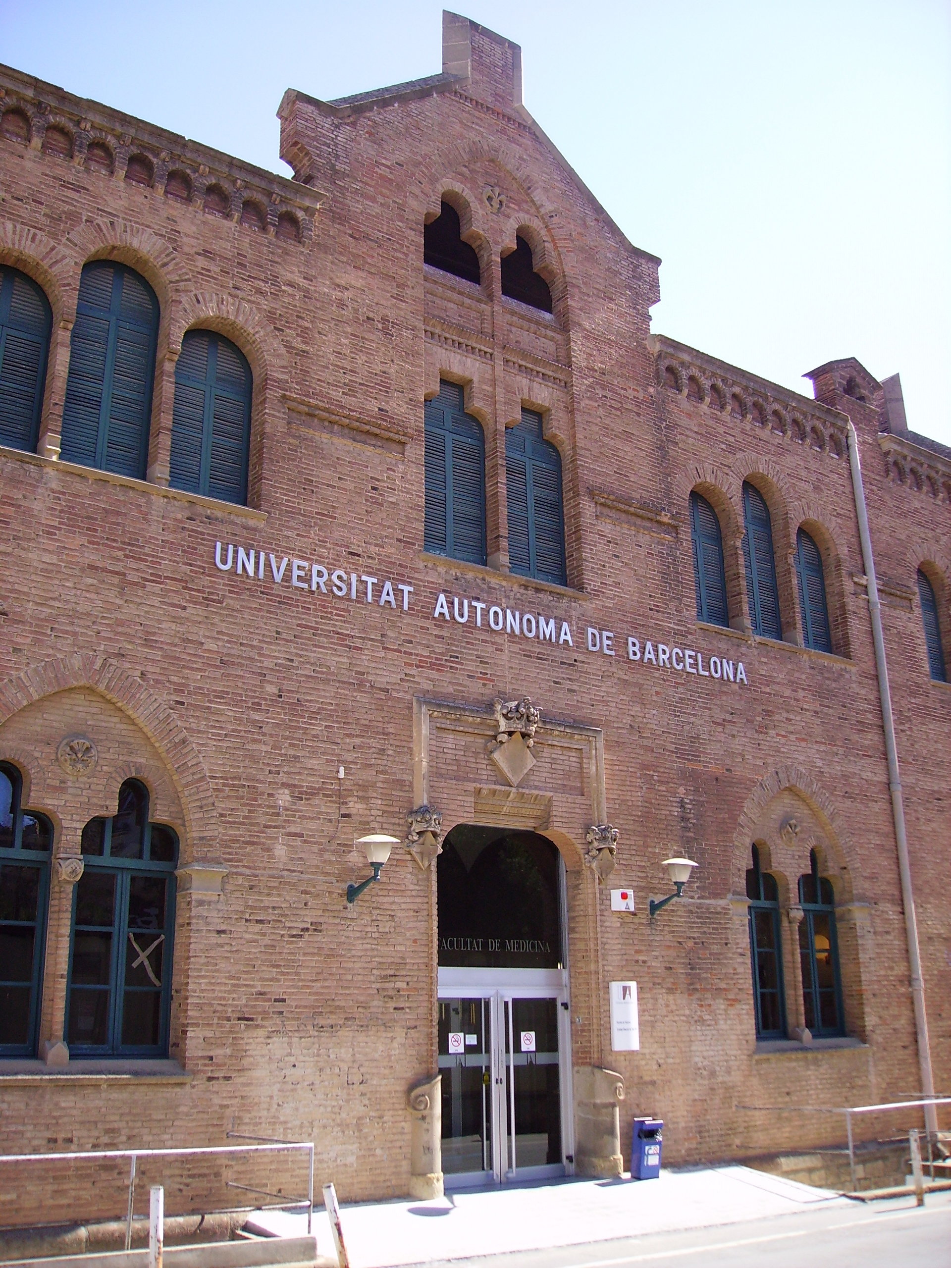 Facultat de Medicina de l'UAB a l'Hospital de Sant Pau, Barcelona, Catalunya.